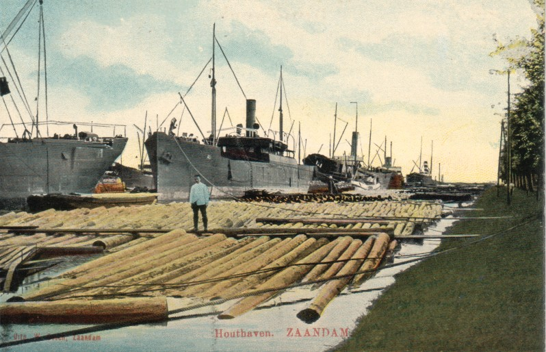 Houthaven, Zaandam. Ansichtkaart van vóór 1910, uit verzameling gebruiker Dolph Kohnstamm